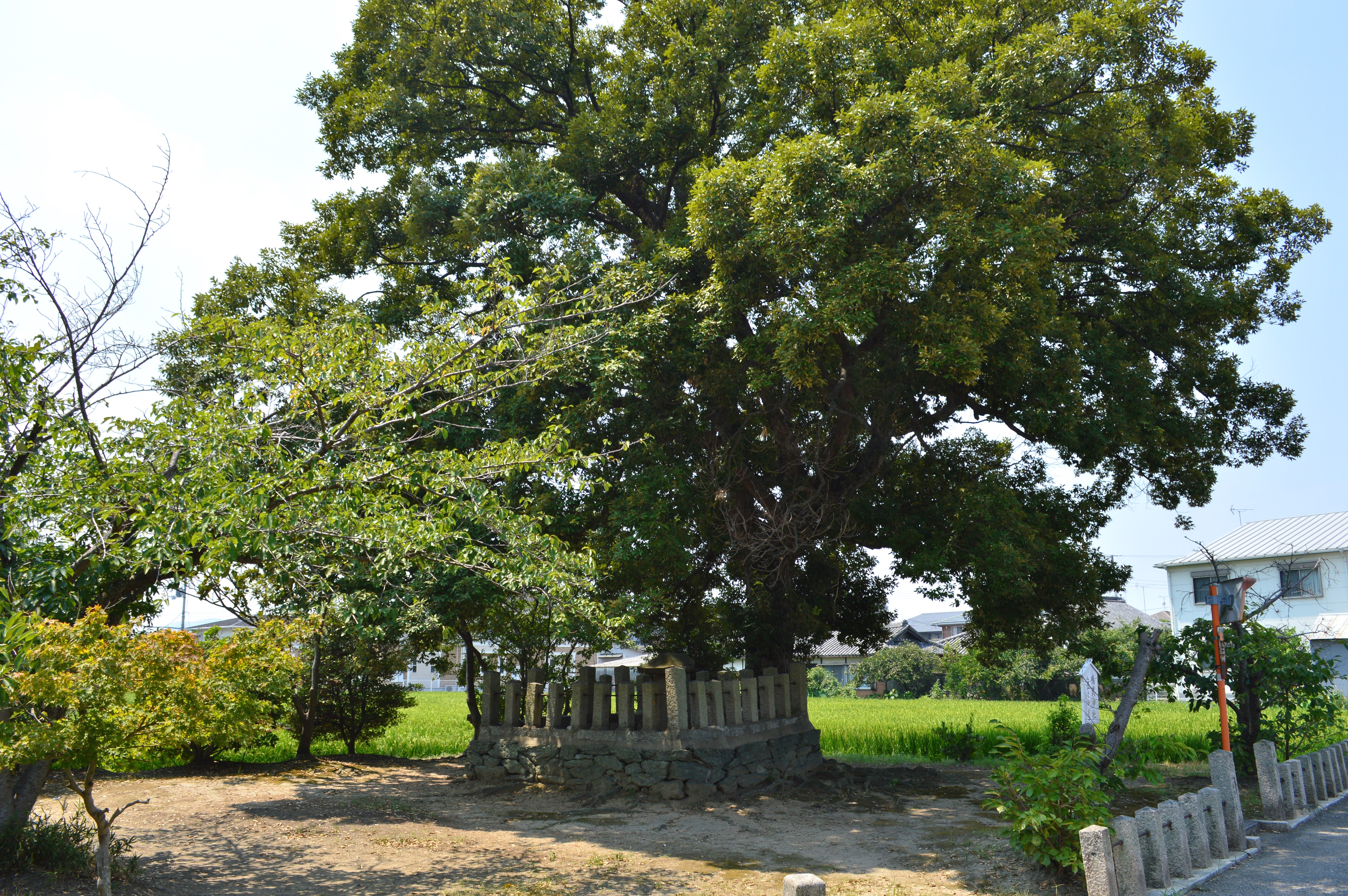 鳴神社 境外鳴武神社